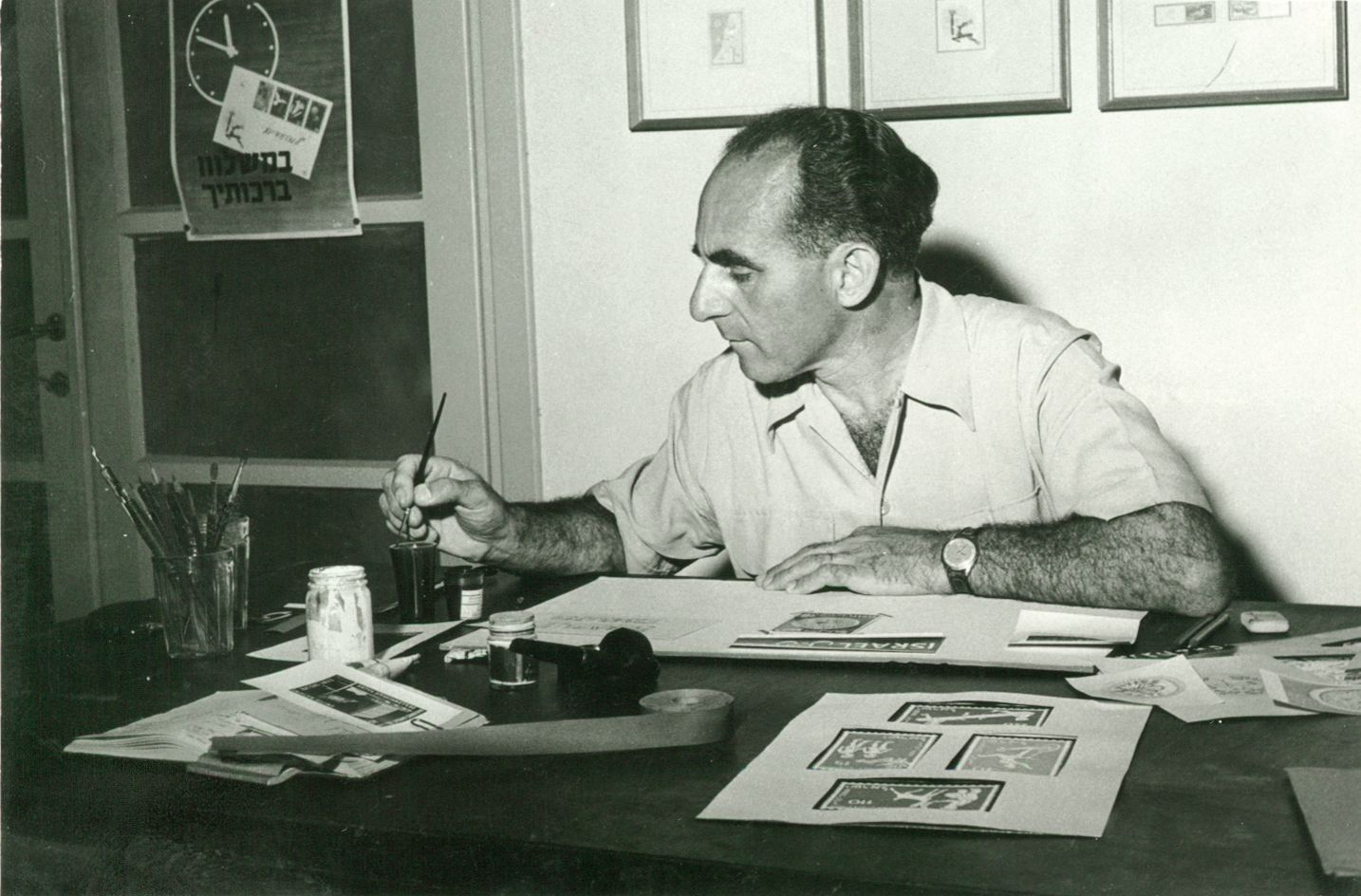 אוטה וליש בעבודתו